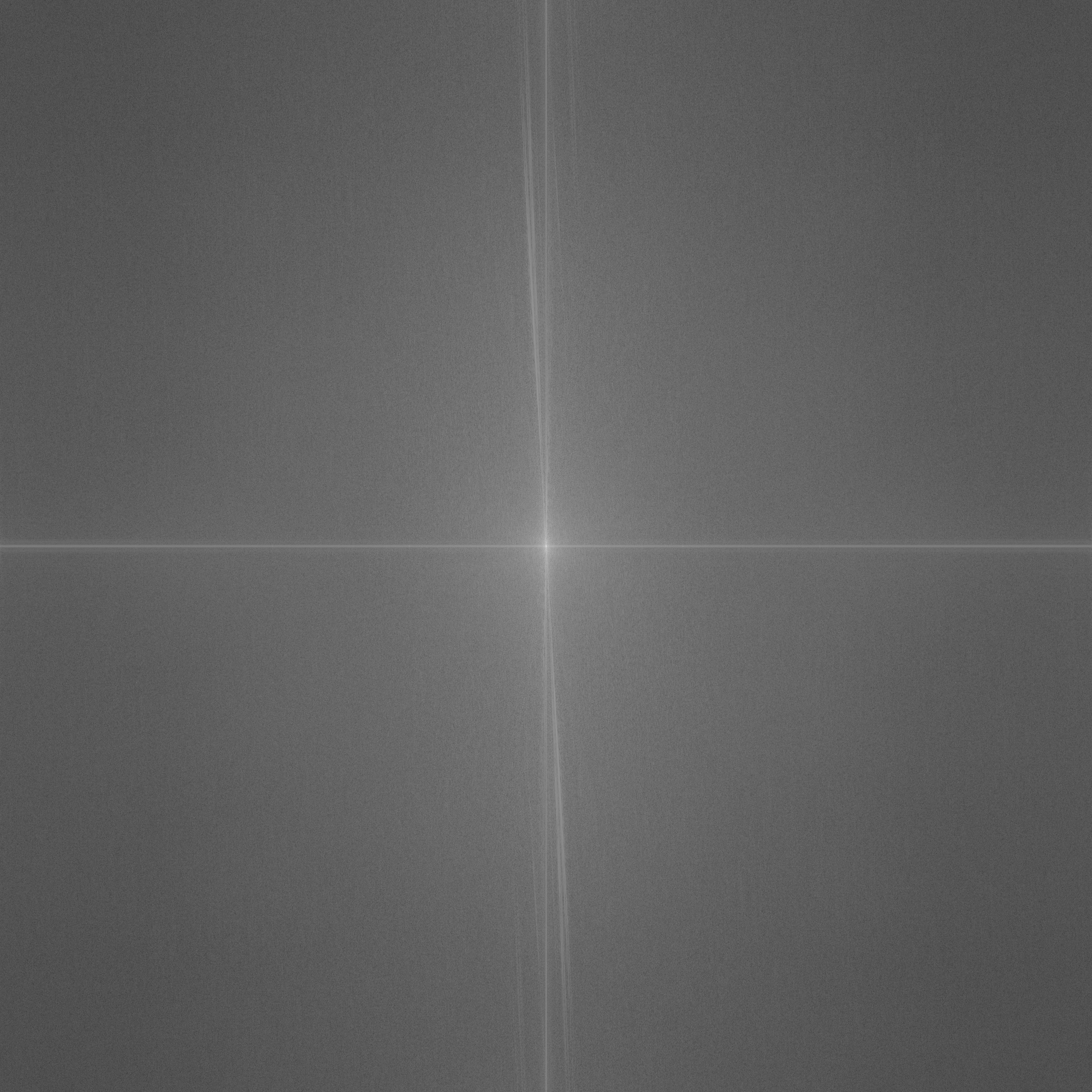 Transformada de Fourier de la imagen original